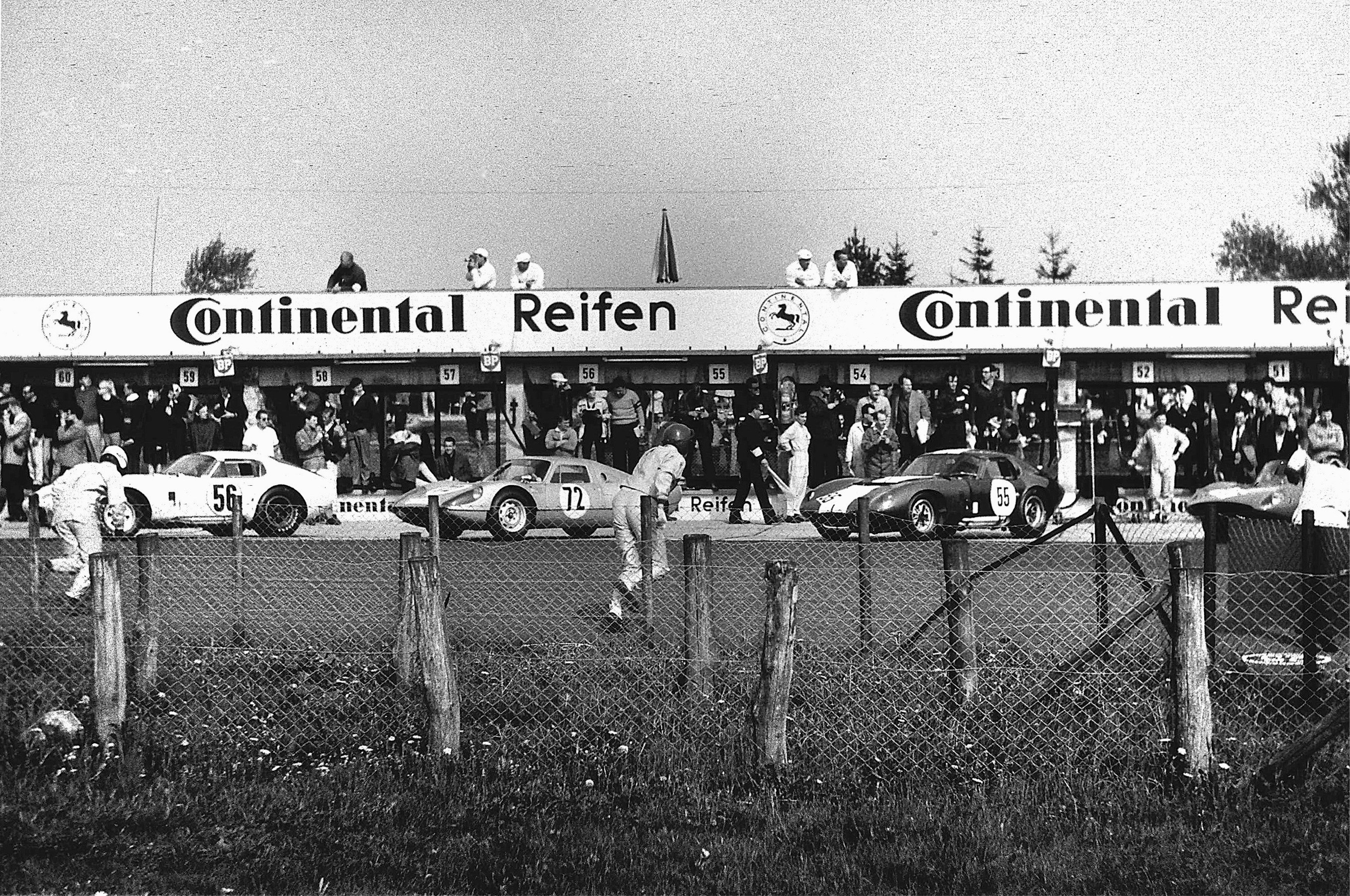 Le-Mans-Start zum 1000-km-Rennen 1965 auf dem Nürburgring, Spurt zu den Wagen